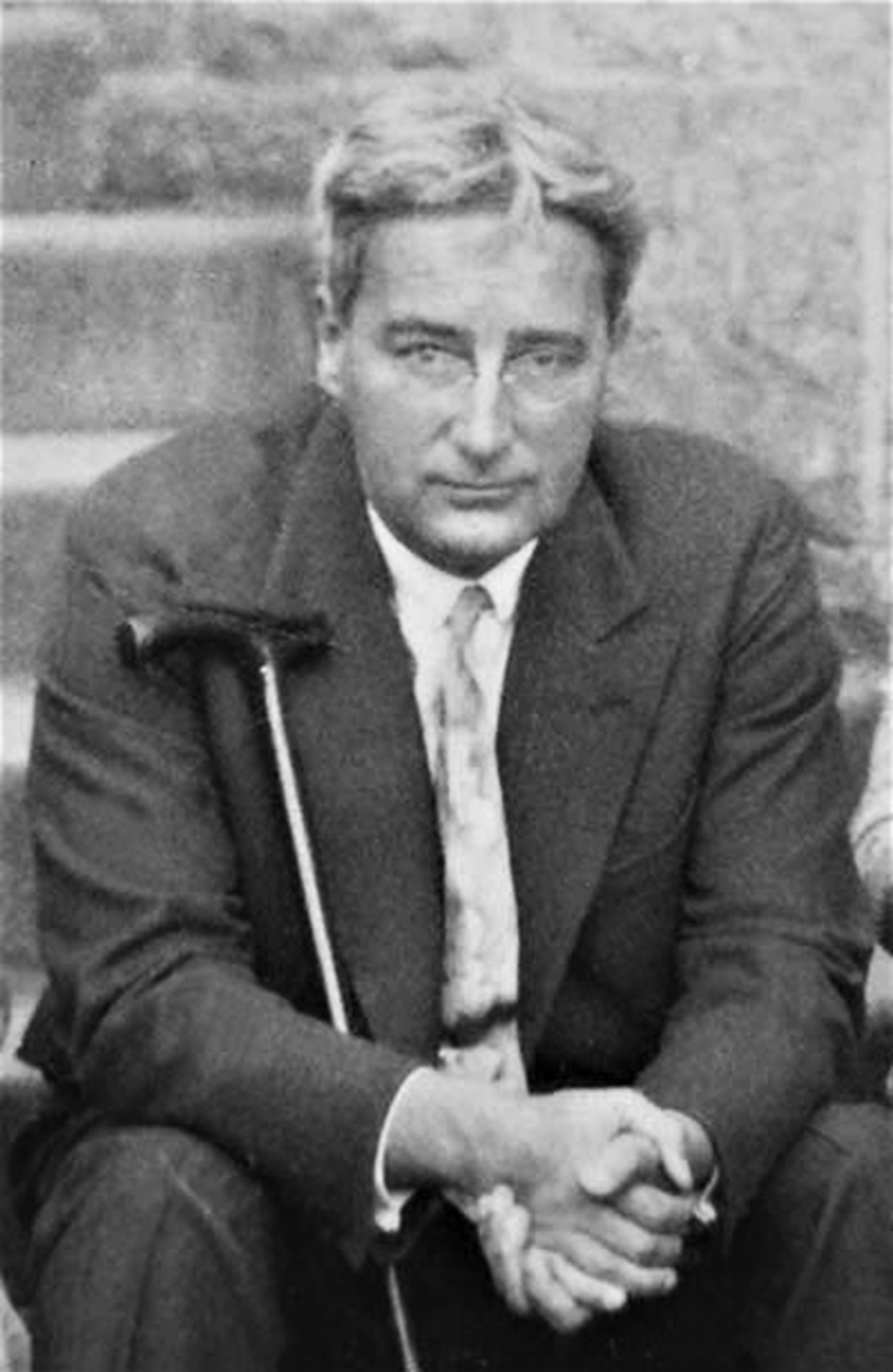 Ernst Albert Gäumann (1893-1963) um 1935